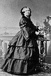 Photo of Eugénie Dutreux-Pescatore